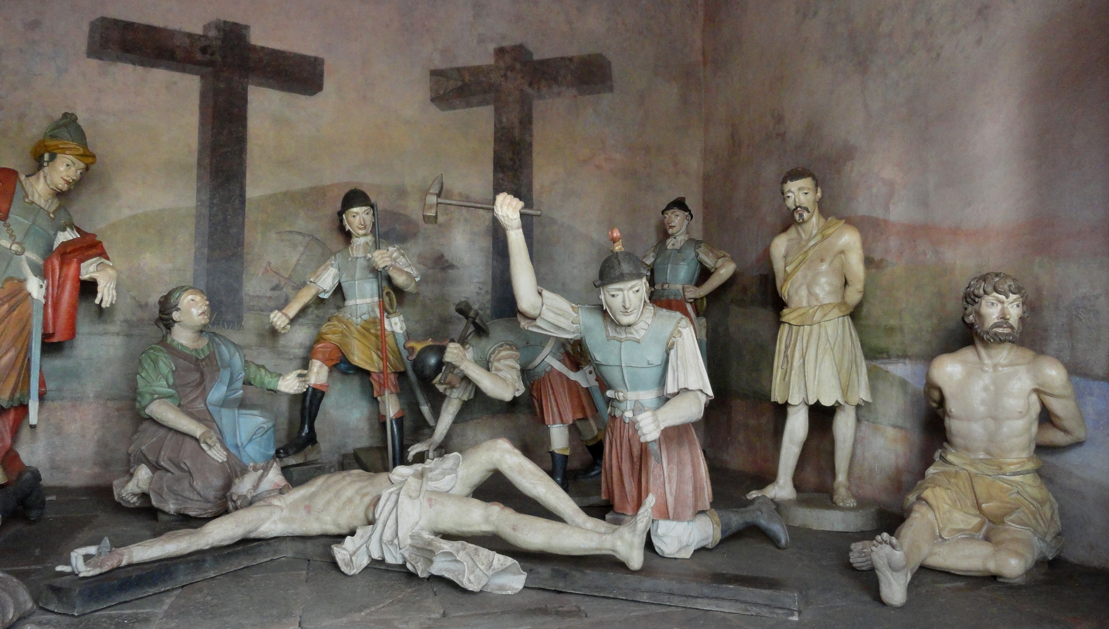 Santuário de Bom Jesus de Matozinhos: conjunto arquitetônico, paisagístico e escultórico